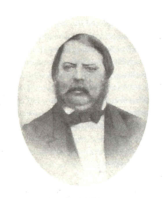 Gottlieb Christian Kreutzberg (1810/14-1874) Deutscher Tierschausteller